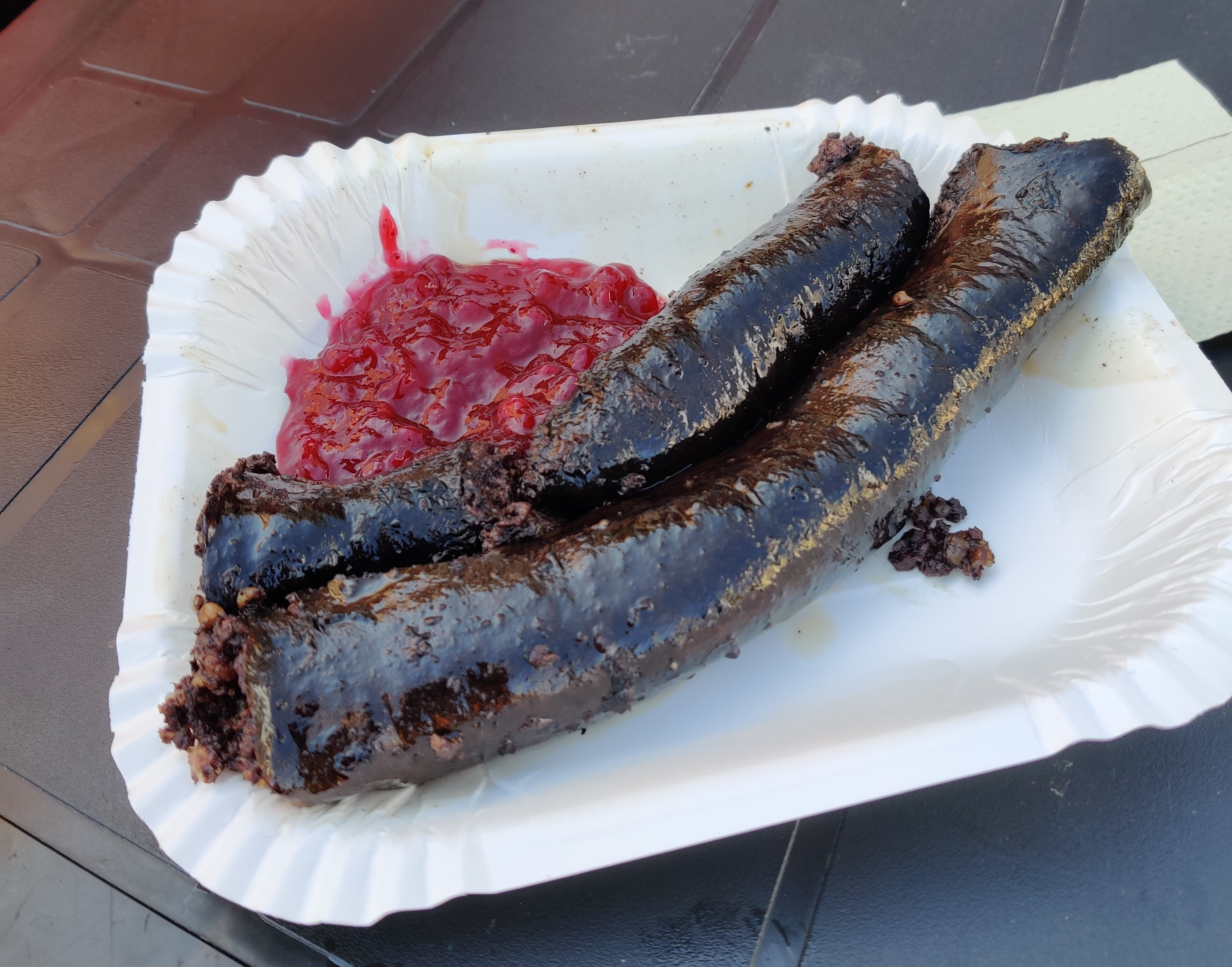 Mustaamakkaraa Tammelantorilla